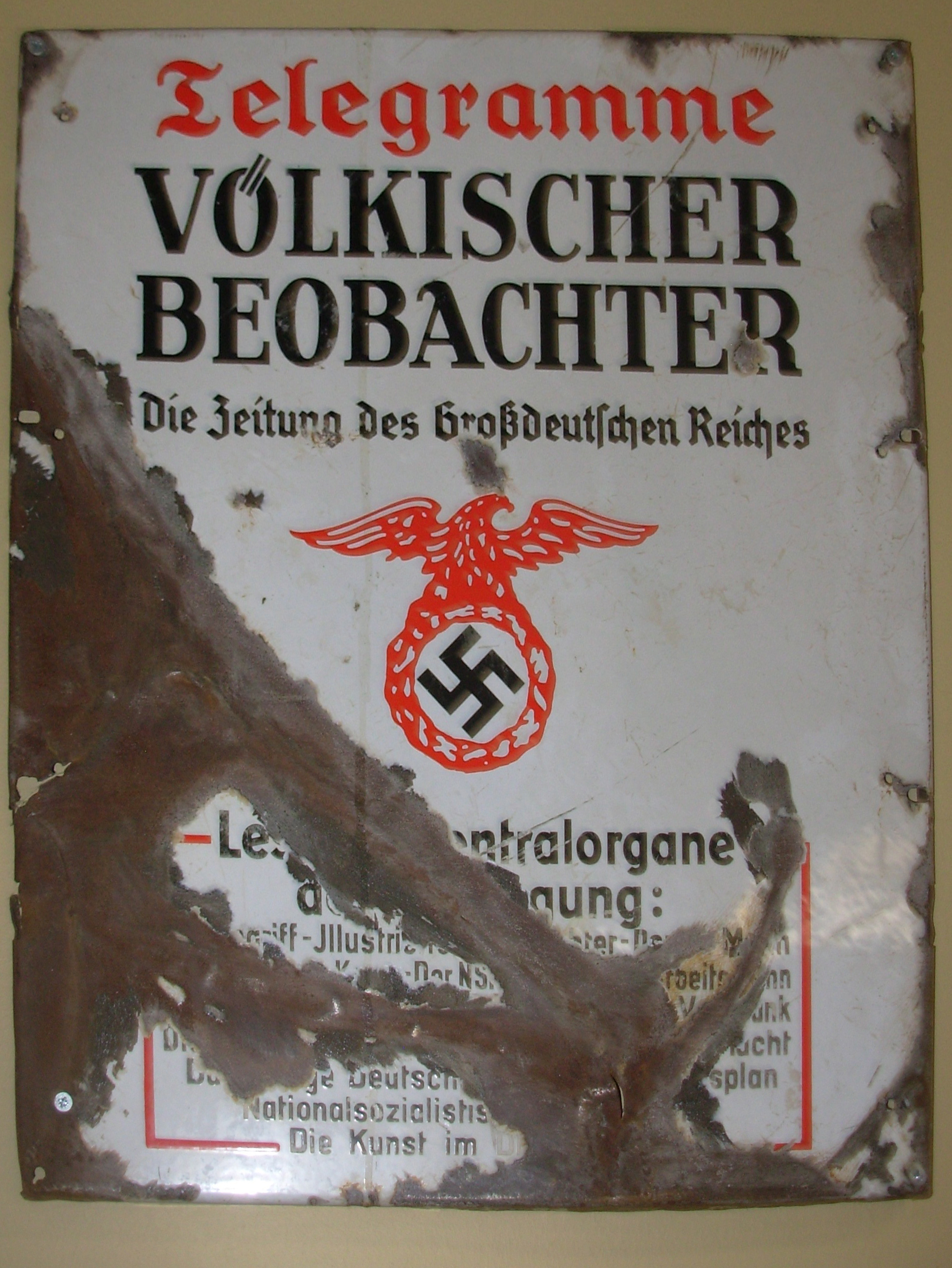 Panneau de publicité pour le Völkischer Beobachter